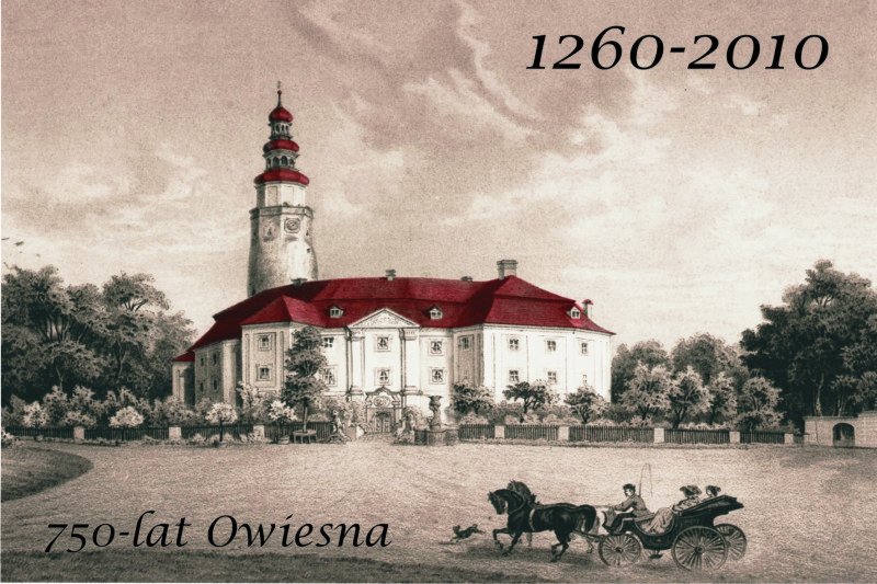 Château de Habendorf (Owiesno en polonais) en basse Silésie polonaise. Ce château est en ruines en 2013.Il a été la propriété des von der Heyde puis des von Seydlitz jusqu'en 1945. La photo date de 1879-1885